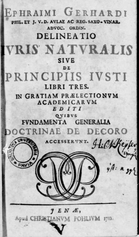 Frontespizio